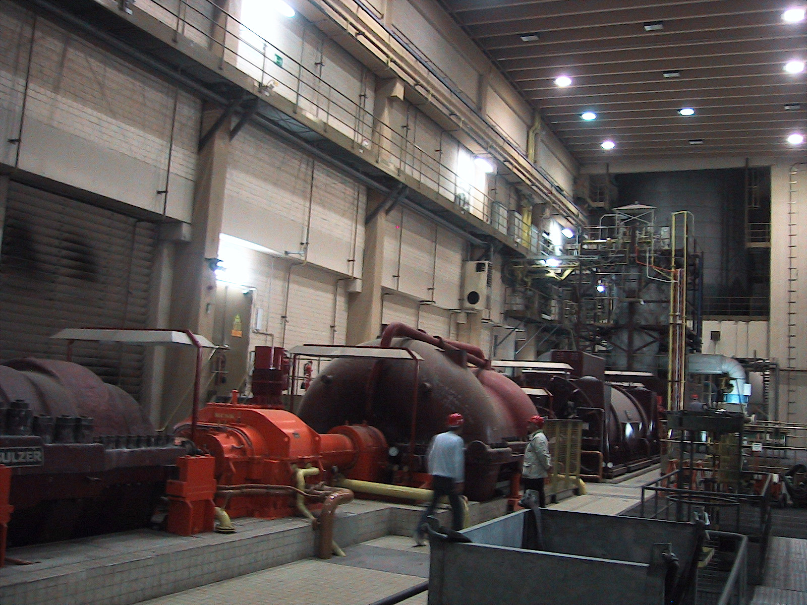 Kraftwerk von innen mit Verdichtern im Vordergrund